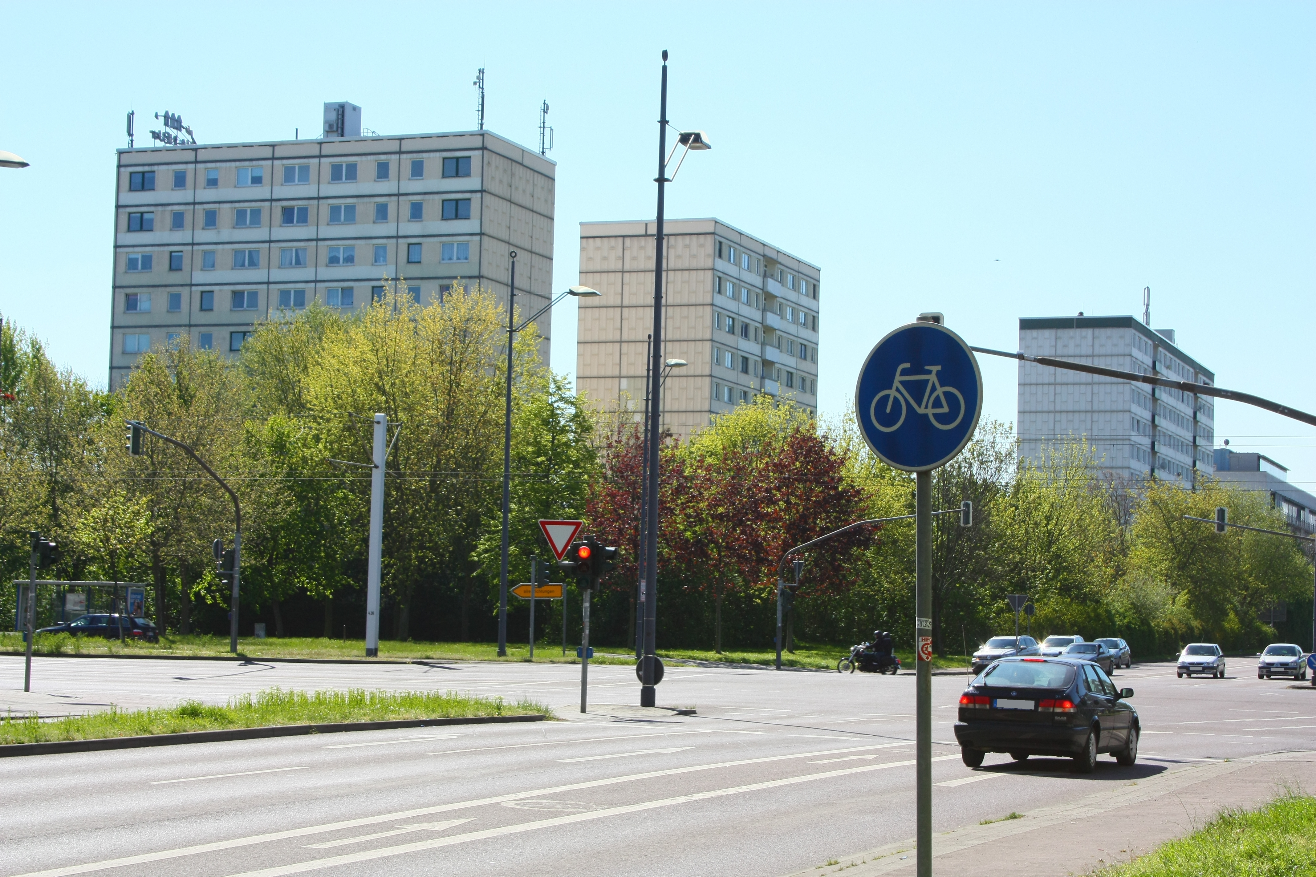 Blöcke südöstlich der Kreuzung der Straßen An der Magistrale und An der Feuerwache in Halle-Neustadt